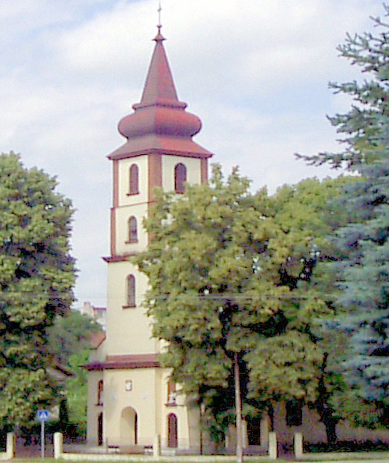 Rímskokatolícky kostol Ruskov